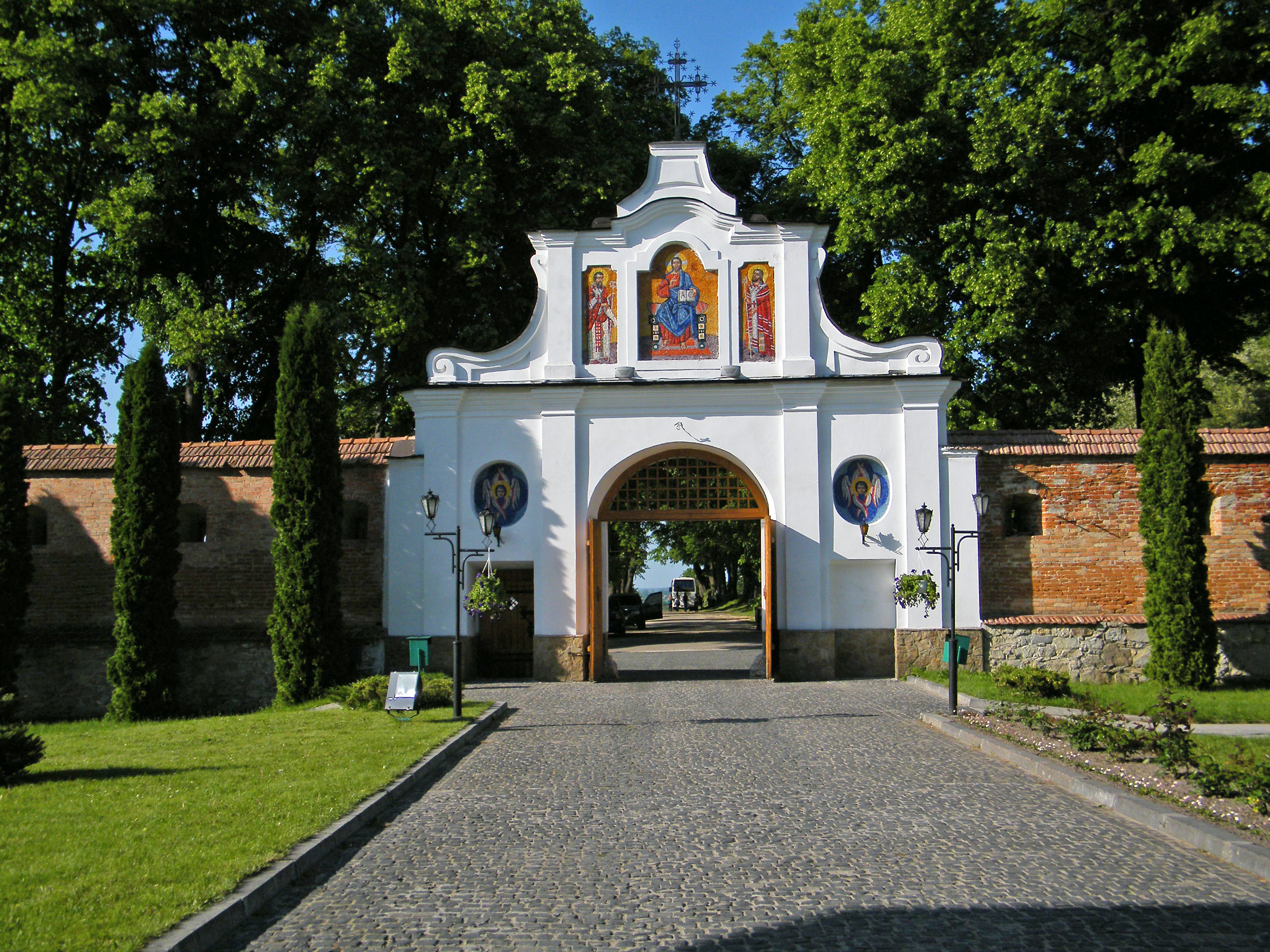 Монастырские ворота